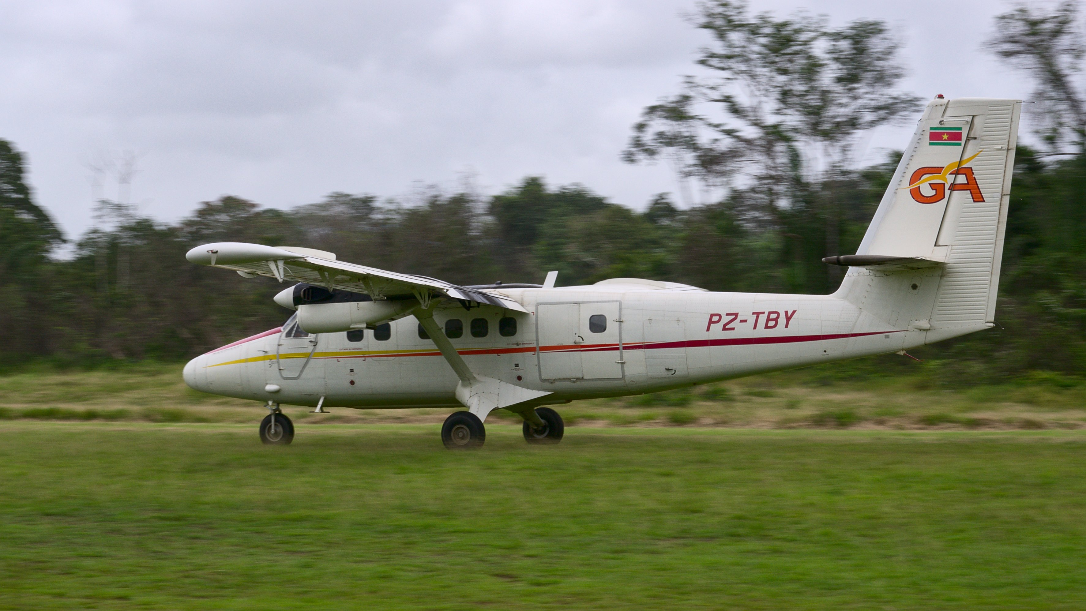 De Havilland Twin Otter